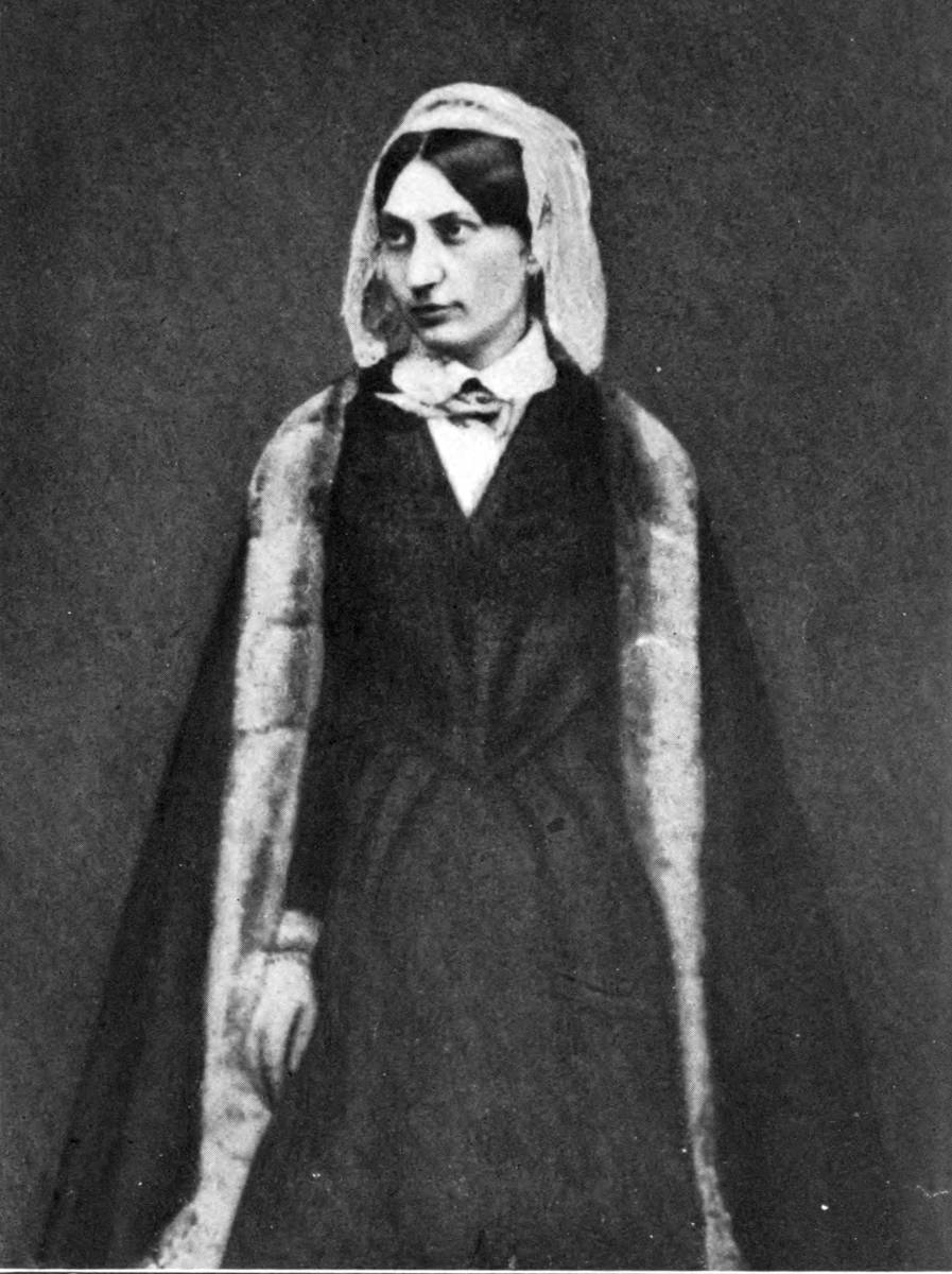 Portrait of Carolyne_von Sayn-Wittgenstein, Daguerreotypie (Detail)